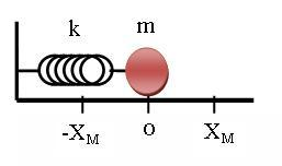 Uma massa ligada por uma mola a uma posição fixa.